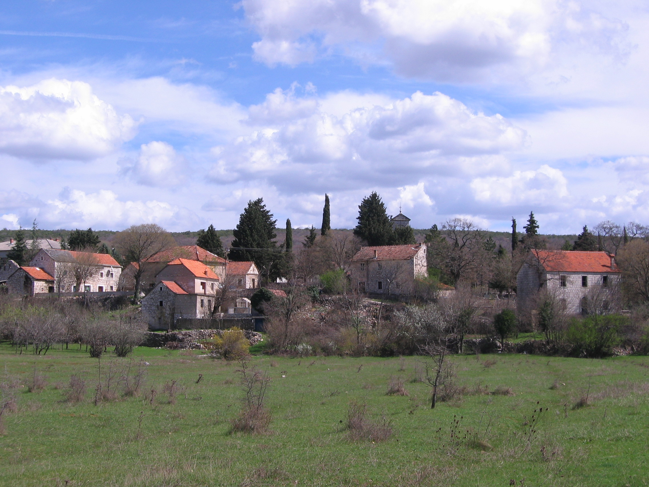 moja slika